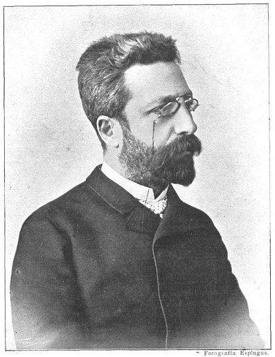 Retrato de Therenci Thos i Codina, fotografía de Antoni Esplugas i Puig recogida en la revista La Ilustració Catalana.